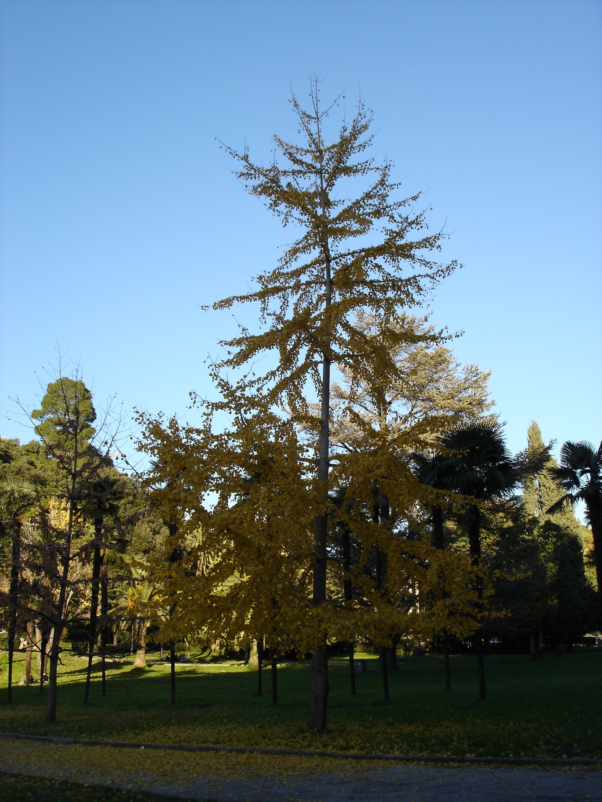 Un Ginkgo biloba au mois de décembre dans le parc du Campus Valrose à Nice.